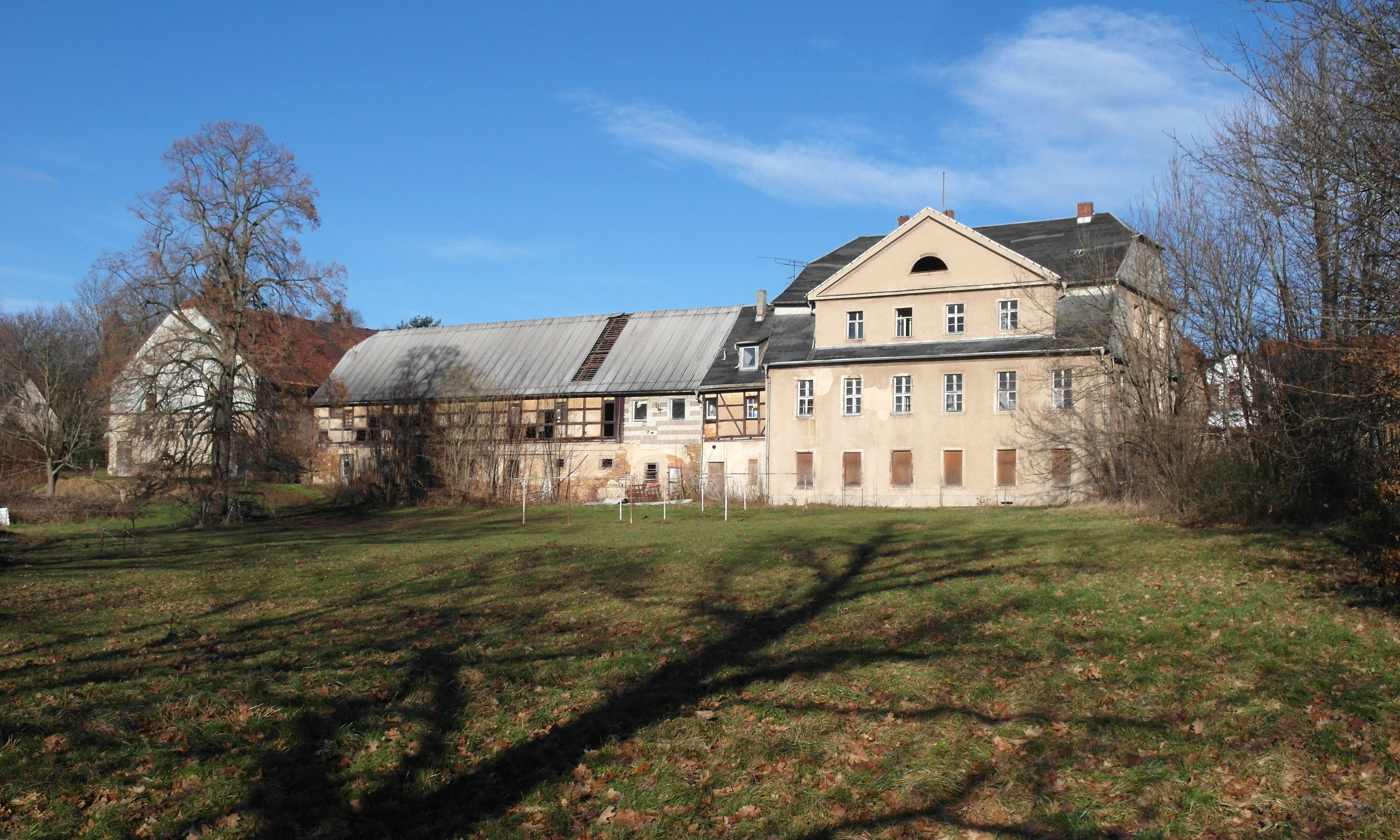 13.12.2017 09387 Leukersdorf (Jahnsdorf/Erzgebirge), Hauptstraße 52: Rittergut Leukersdorf (GMP: 50.766858,12.822451). Um 1778 gelangte das Rittergut an die Familie Ayrer, für die in der ersten Hälfte des 19. Jahrhunderts das noch vorhandene Herrenhaus (rechts im Bild) errichtet wurde. Sicht von Süden. [SAM3275.JPG]20171213110DR.JPG(c)Blobelt